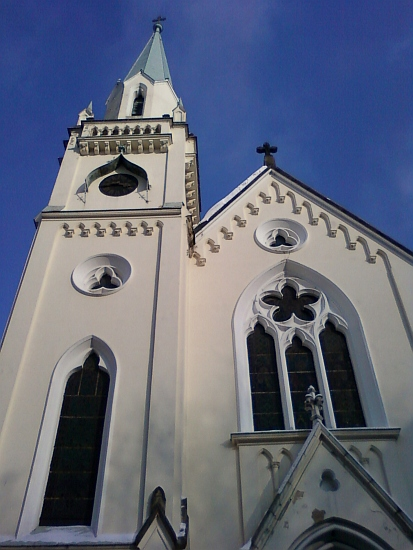 Klášter sv. Voršily (Liberec), ul. Klášterní 117/2, Liberec